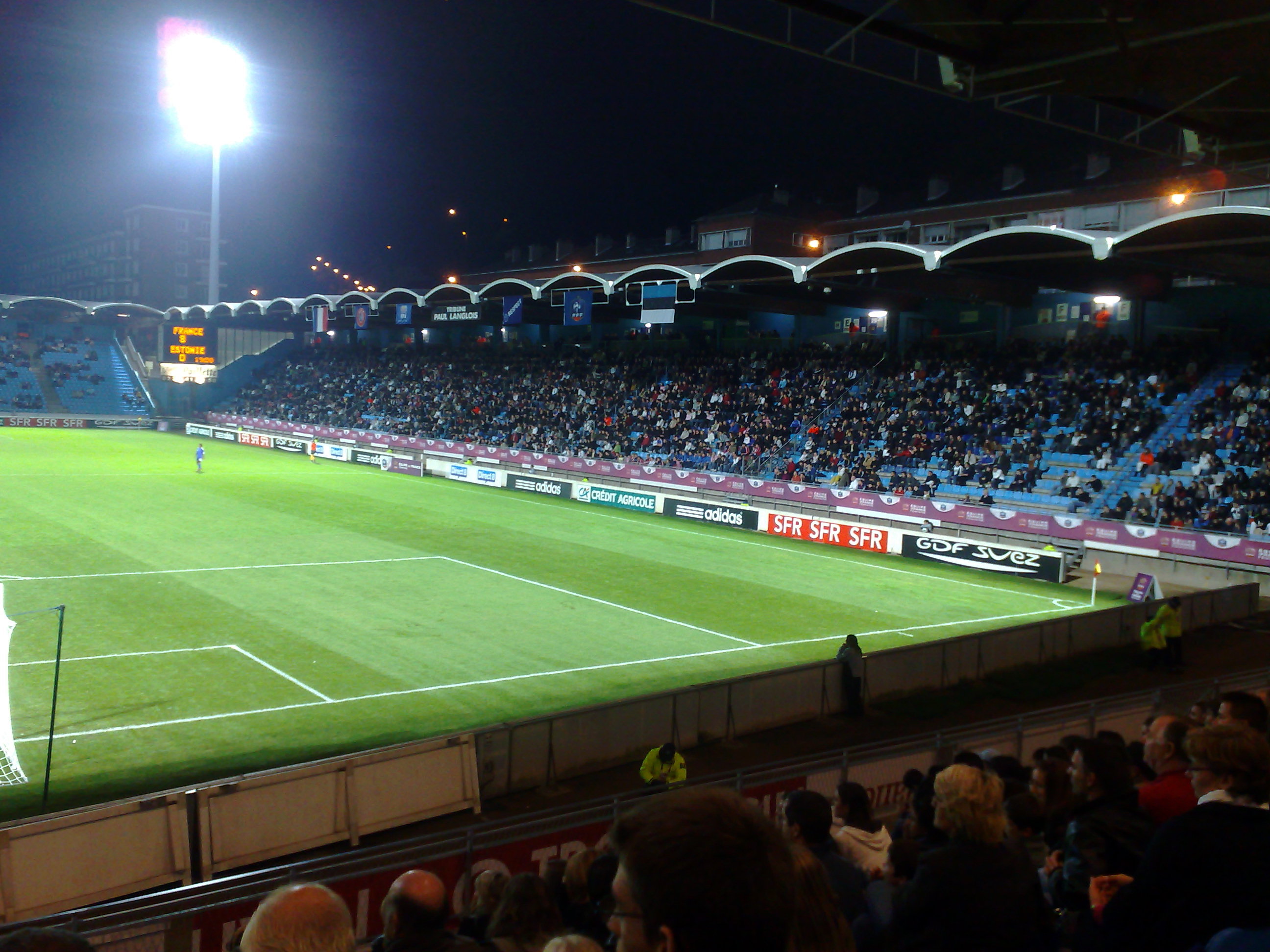 Le stade Jules Deschaseaux du Havre, lors du match qualificatif pour le Mondial Féminin 2011 entre la France et l'Estonie (12-0), le 28 octobre 2009.